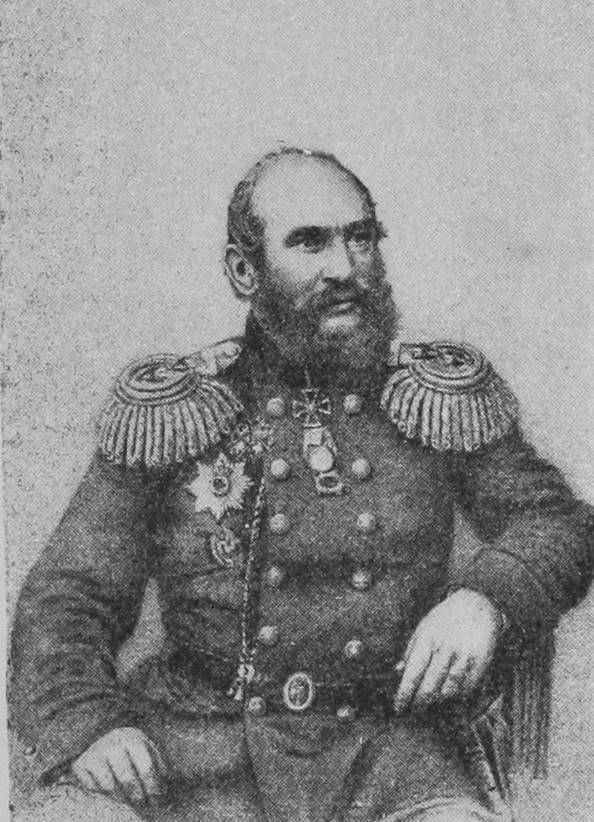 Генерал Семён Ильич Зеленой. Это изображение было использовано для иллюстрирования статьи «Зеленой» опубликованной в десятом томе «Военной энциклопедии», который был издан книгоиздательским товариществом И. Д. Сытина в 1912—1913 гг. в столице Российской империи городе Санкт-Петербурге.